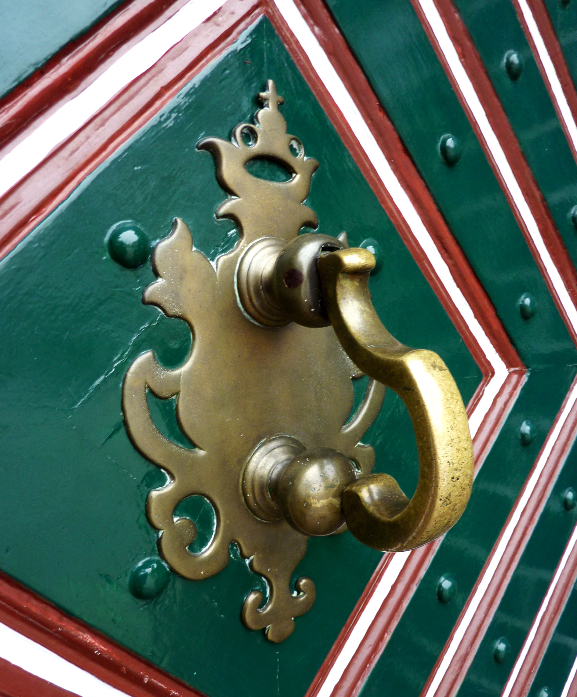 Grüne Holztür mit Türklopfer aus Messing in Lüneburg, Niedersachsen.